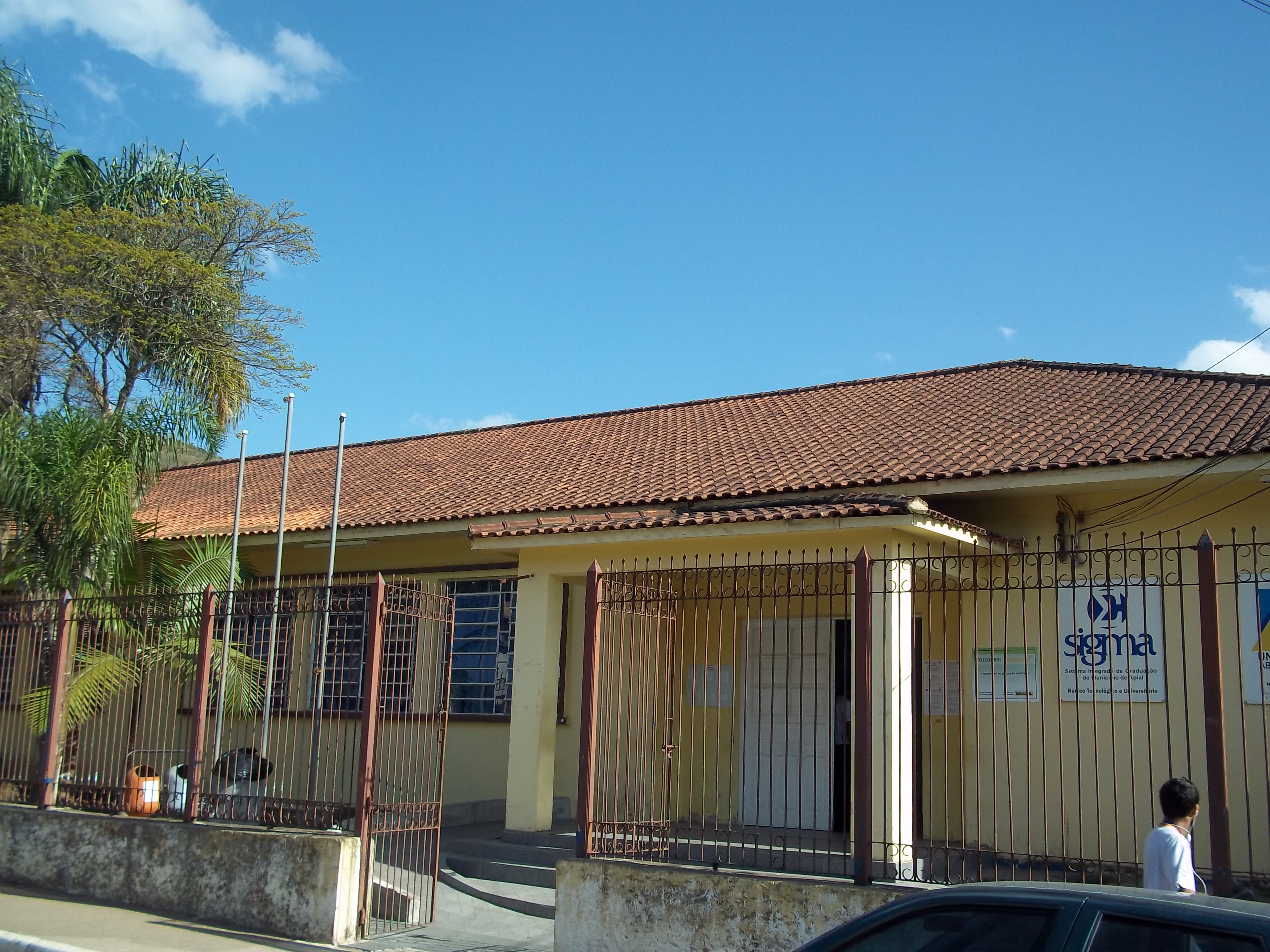 Predio do Sigma durante reforma